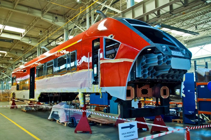 Spalinowy zespół trakcyjny Pesa Link 633 001 dla Deutsche Bahn podczas produkcji w zakładach Pesa Bydgoszcz.